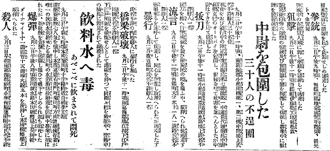 「関東一帯を騒がした鮮人暴動の正体はこれ : 放火殺人暴行掠奪につぎ橋梁破壊も企てた不逞団」中段。